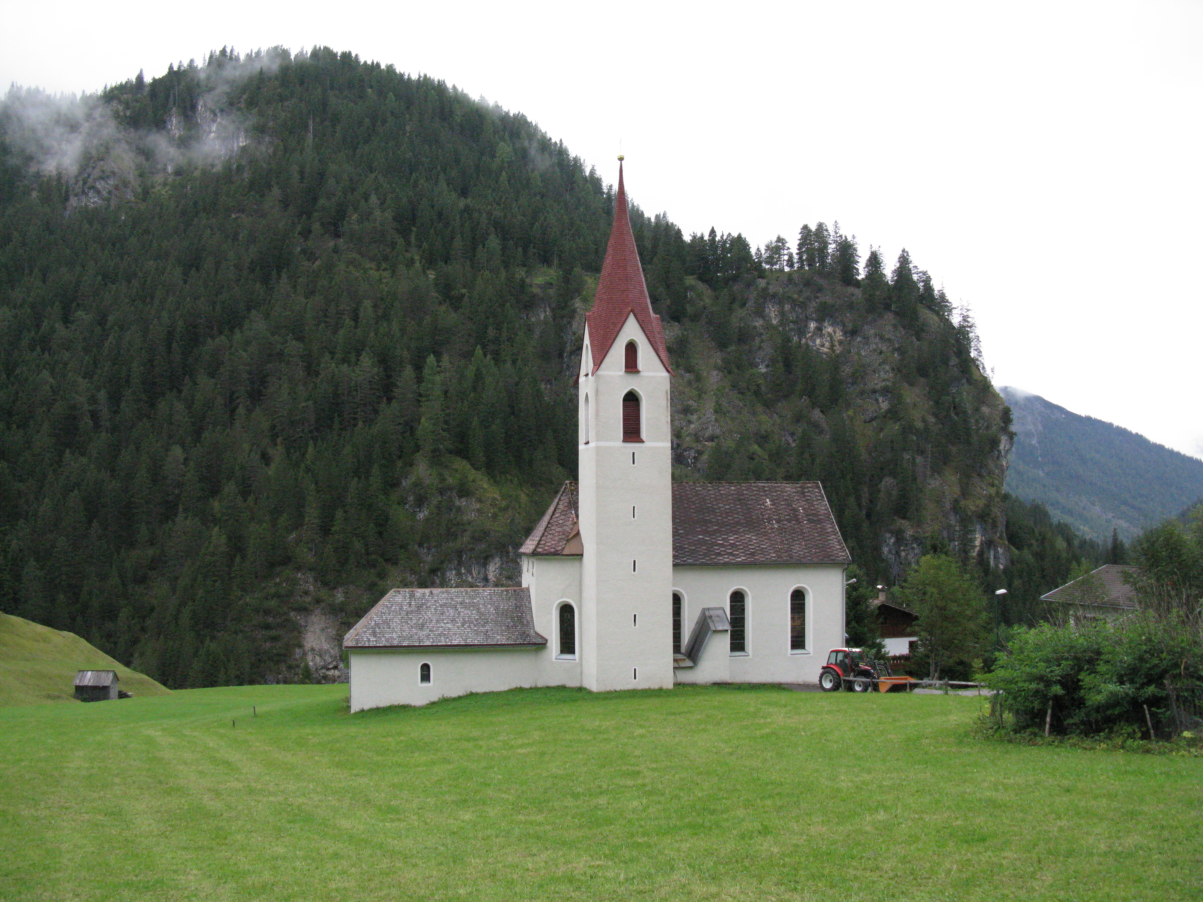 Kirche